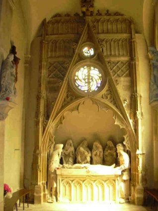 Mise au tombeau, début du XVe siècle